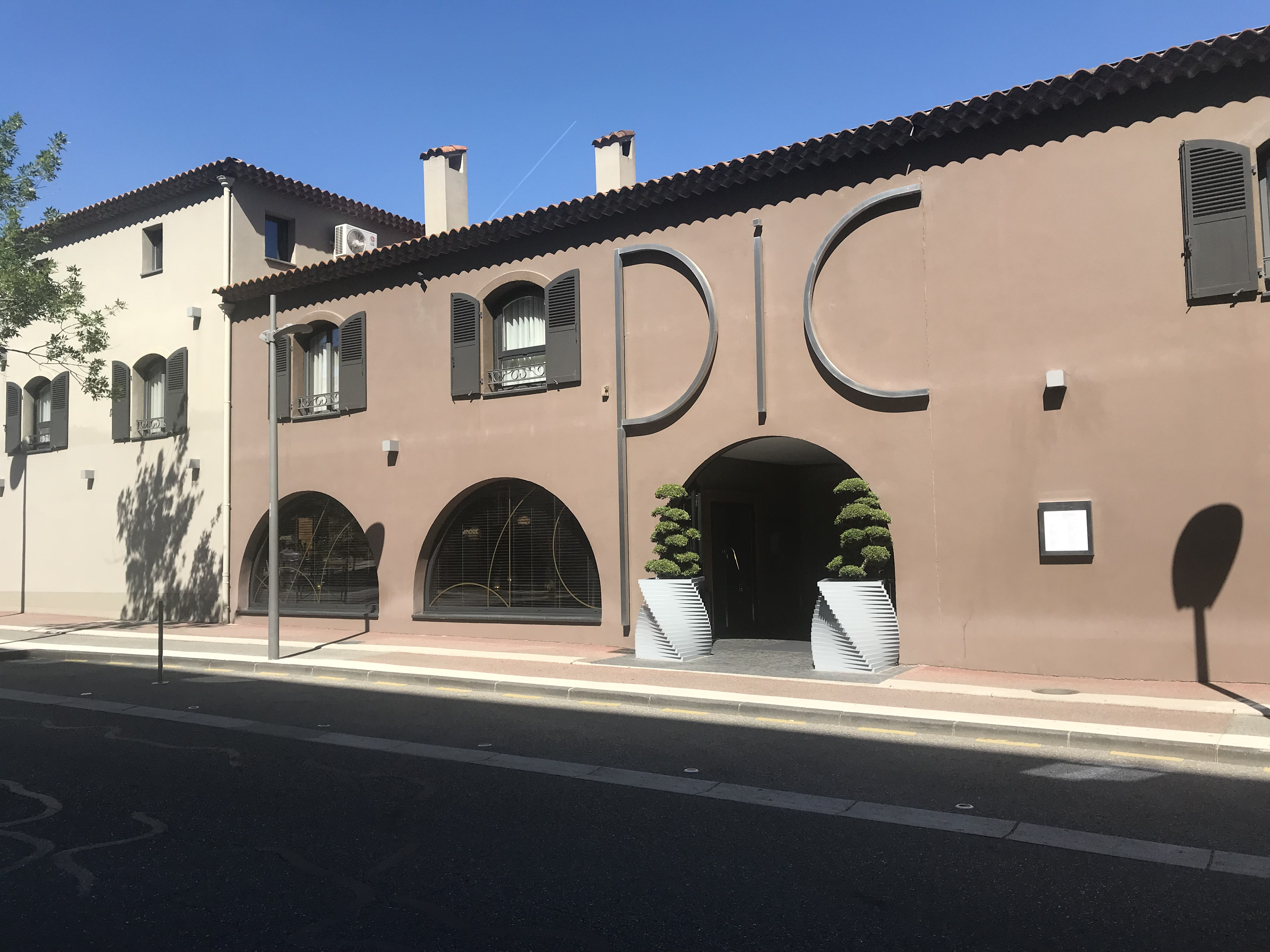 Maison Pic, Valence, Drôme, France.